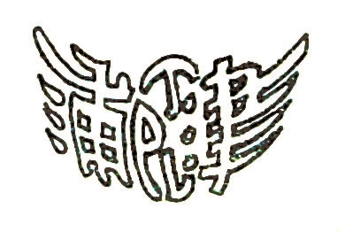 中文（中国大陆）: 津浦铁路和铁路管理机构在1937年以前的标志。标志的外形上是展开的双翼，中间的三个字母组成了翼轮的形状，颇具动感。右边的汉字是“津”，即天津市，而左边的汉字是“浦”，即南京市浦口区，是铁路两端的起点；"T""P""L"分别是“天津”(Tientsin)、“浦口”(Pukow)和“线路”(Line)的意思，意即“天津-浦口线路”。